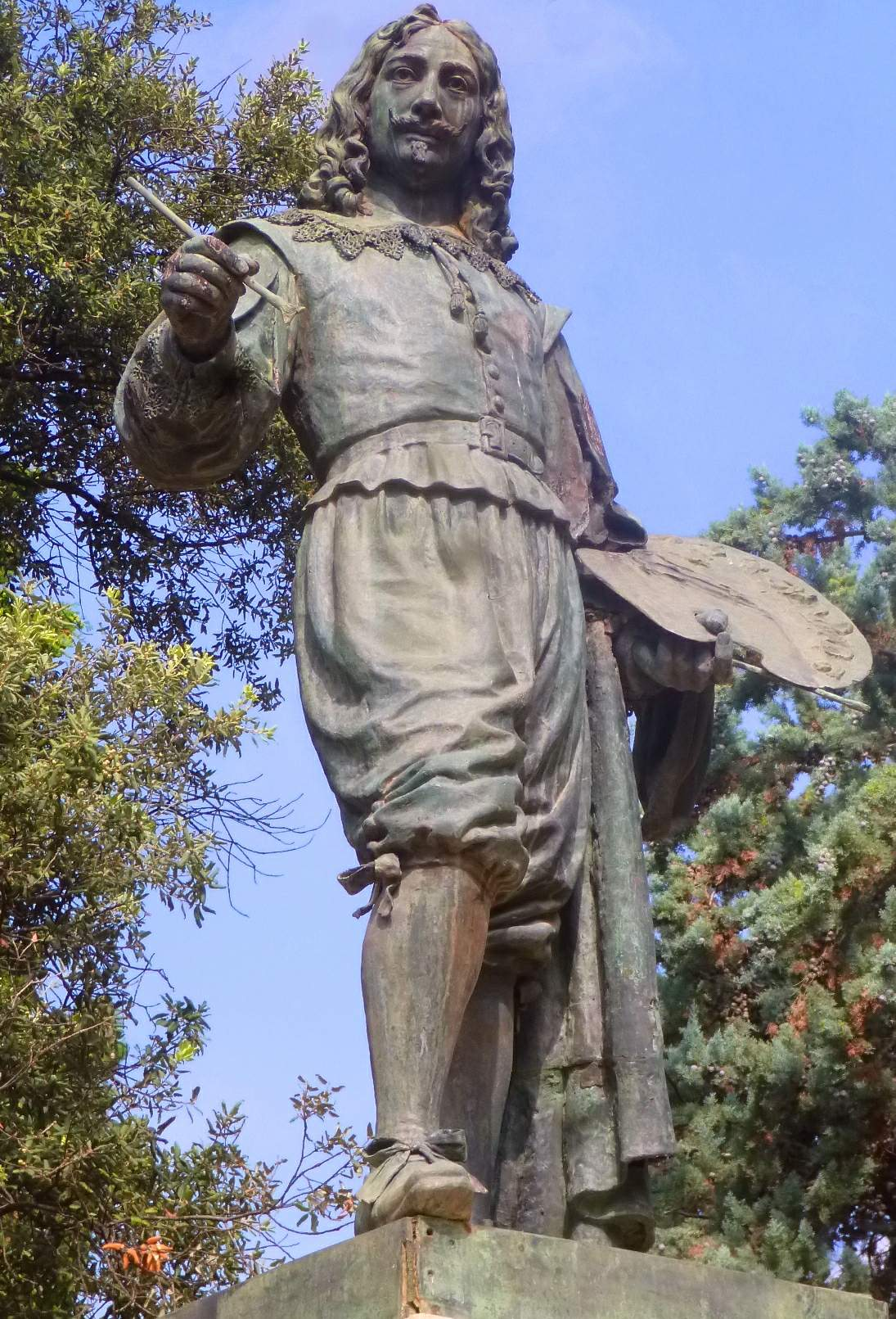 Monumento a José de Ribera (Játiva, Valencia)